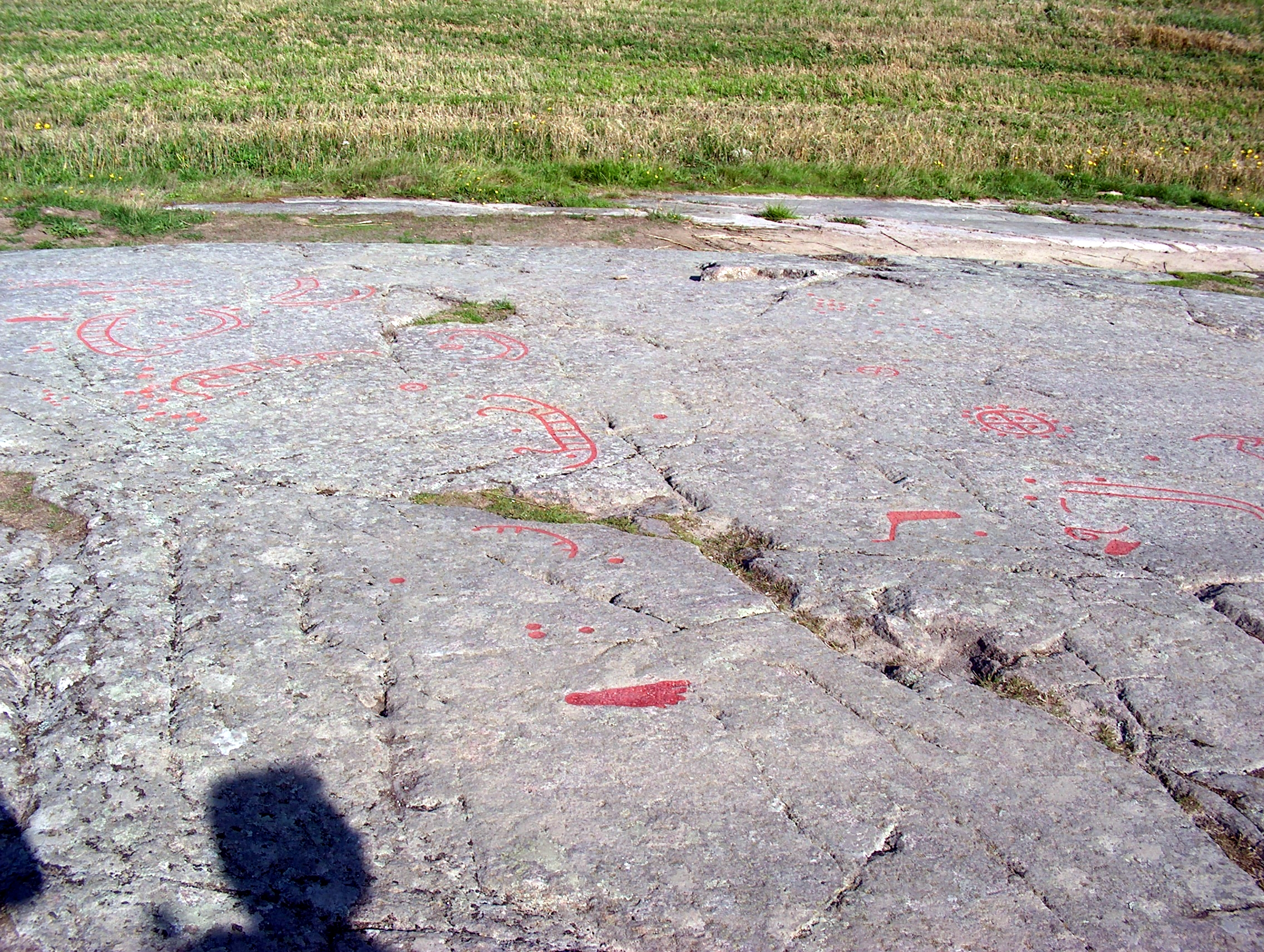 Madsebakke helleristningsfelt på Bornholm, Danmark.